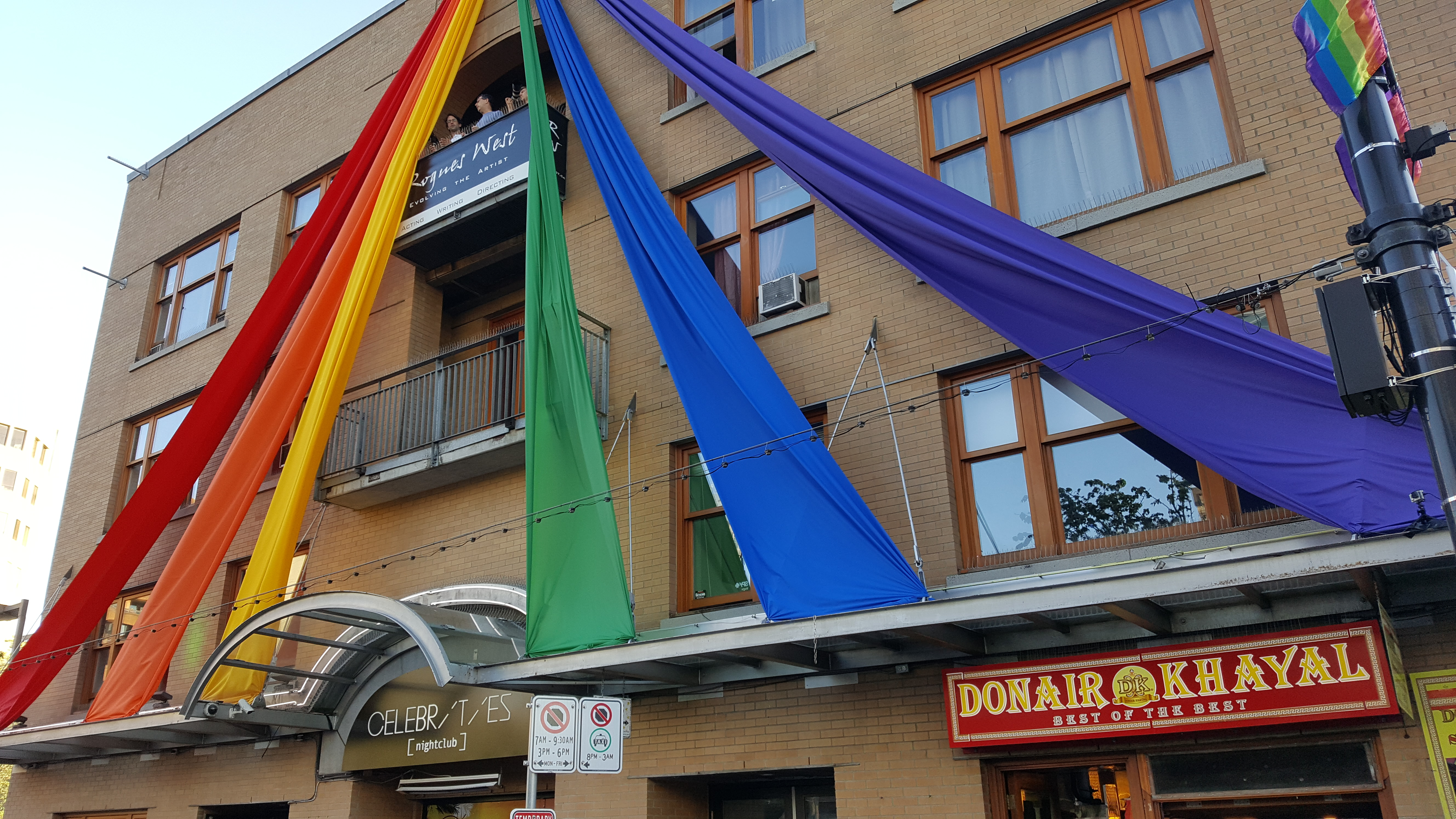 Celebrities